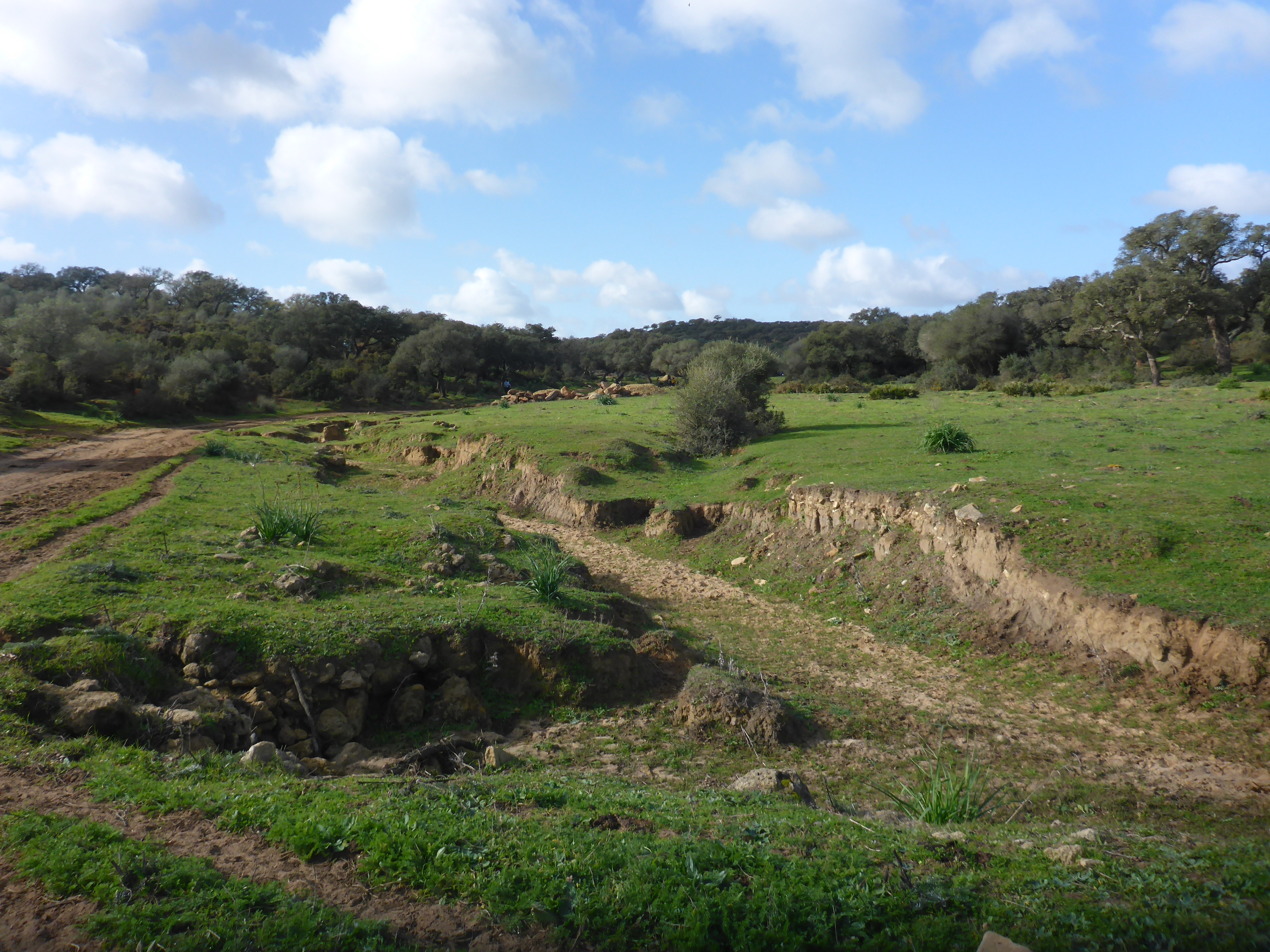 Sierra del Retín (Barbate, España)